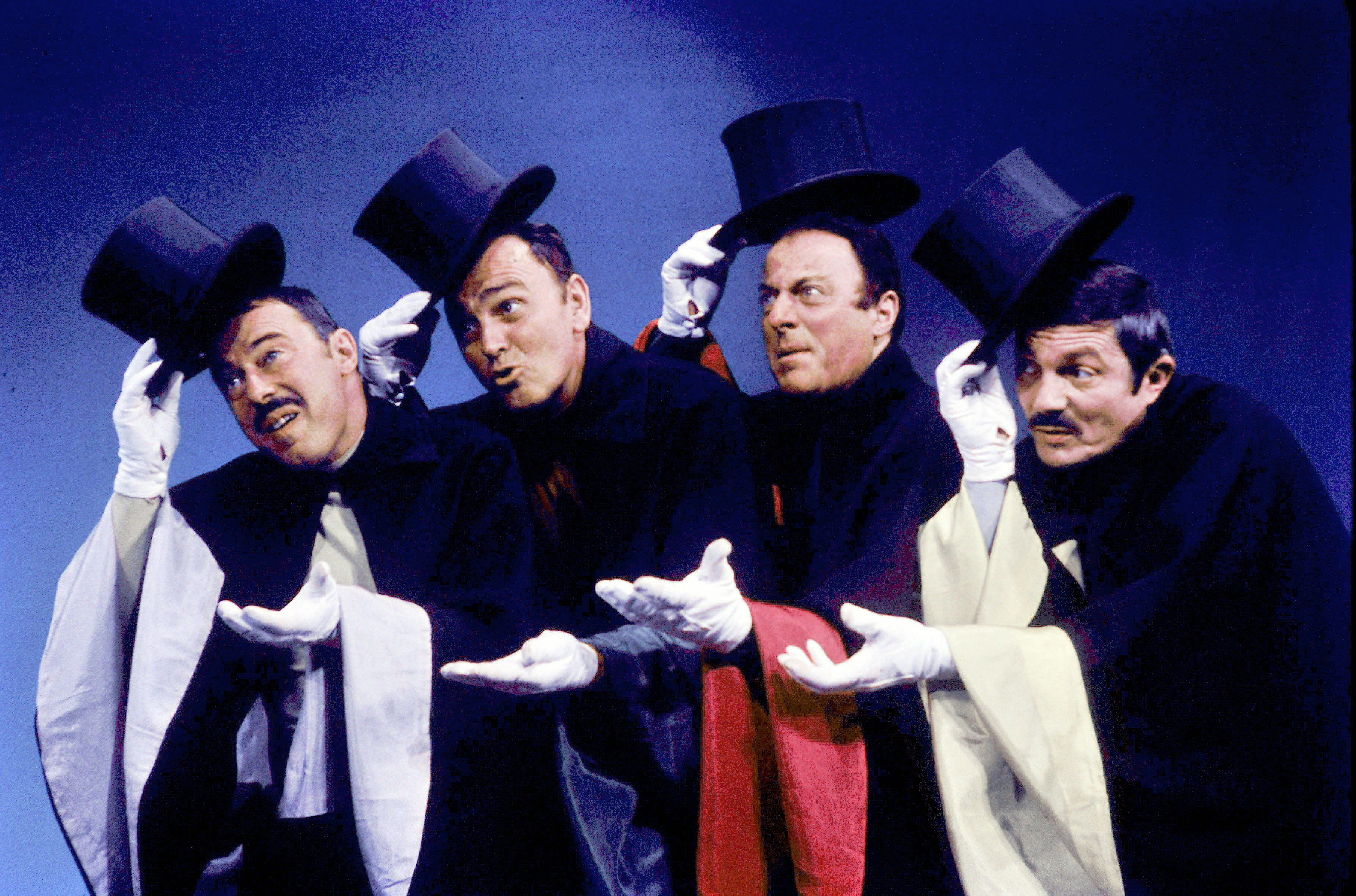 Récital des Frères Jacques.